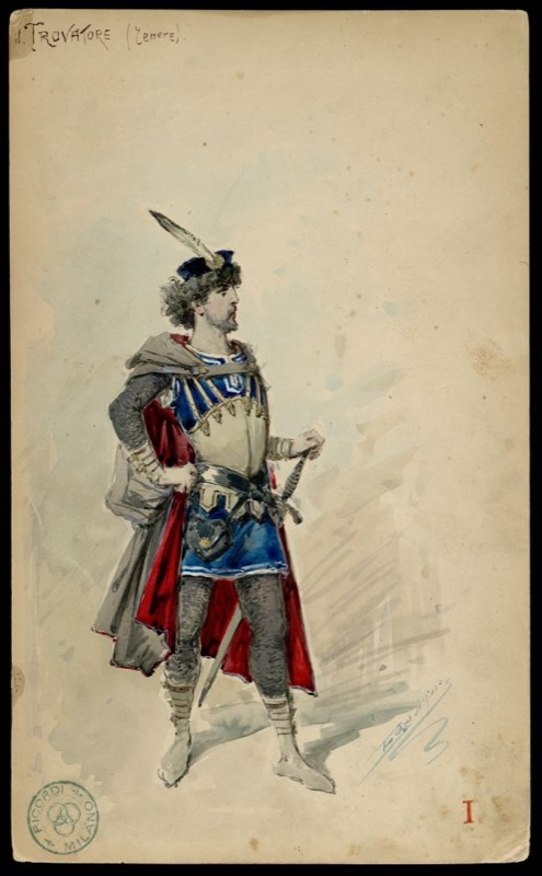 Figurino di Alfredo Edel per l'allestimento scaligero del 1883.